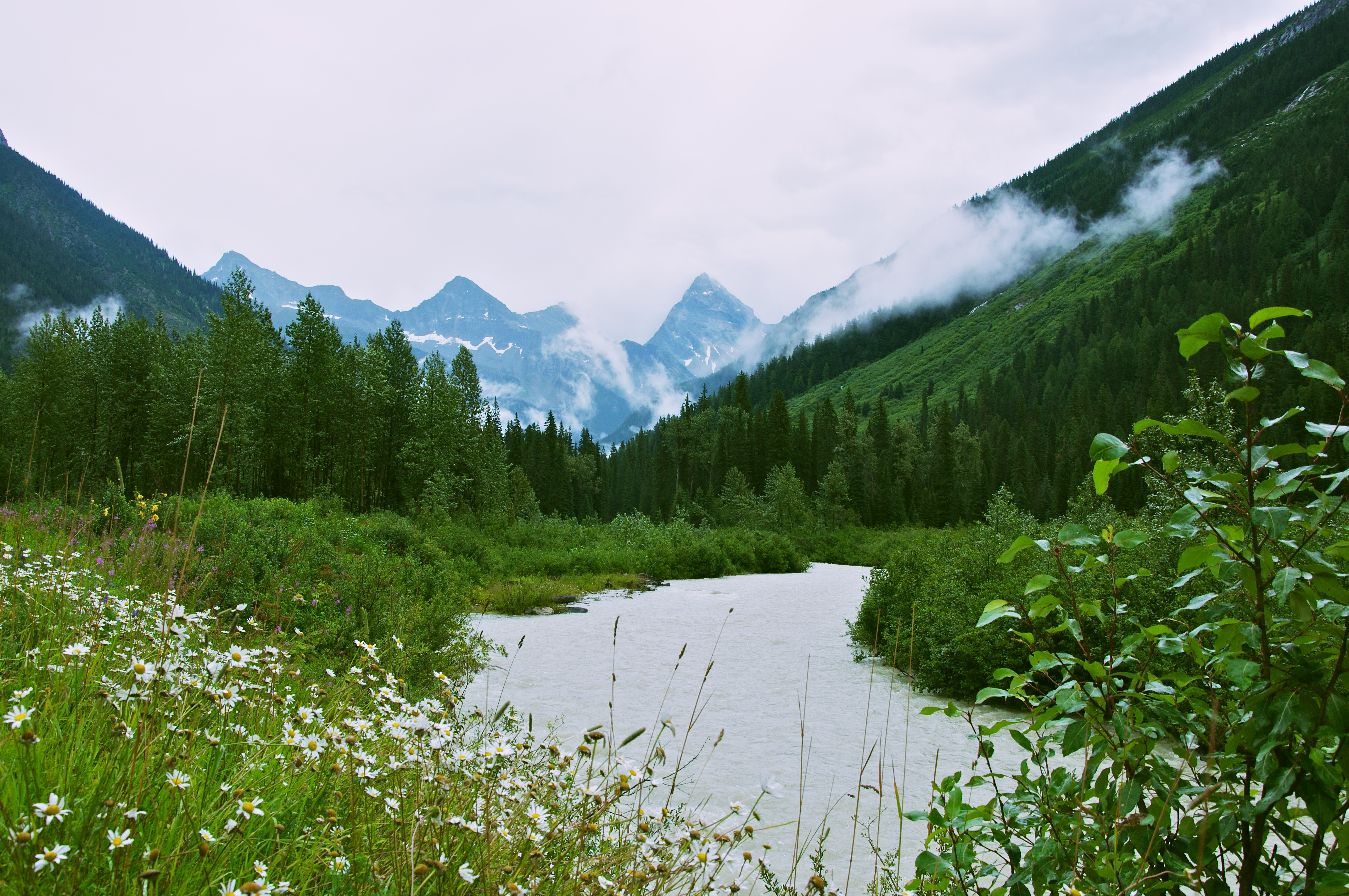 Vu dans le parc national des Glaciers près du col Rogers